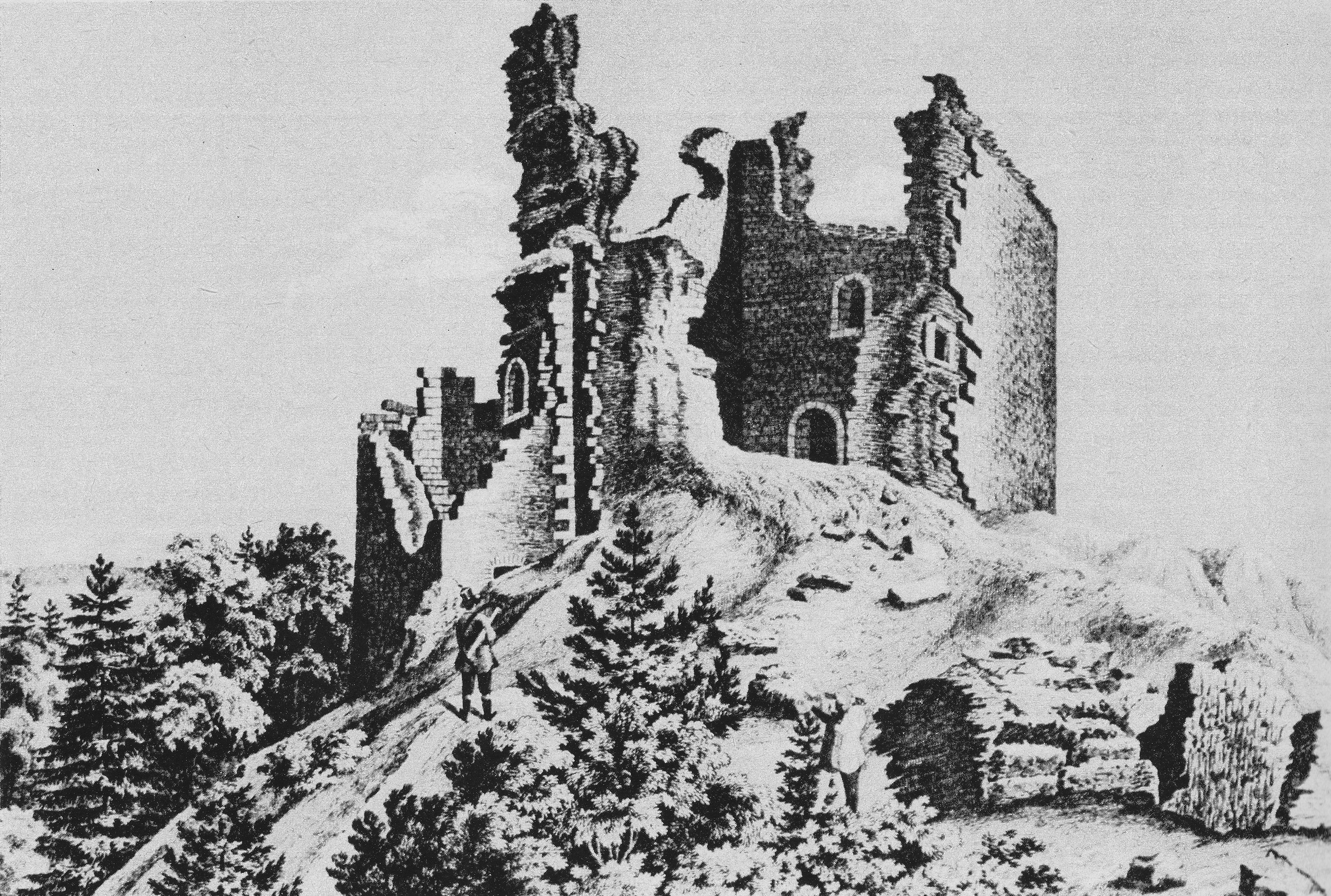 Burg Přimda, Westböhmen, Tschechische Republik. Ruine der Burg von Südwest. Stich nach einer Zeichnung von F. A. Heber aus dem Jahr 1848.